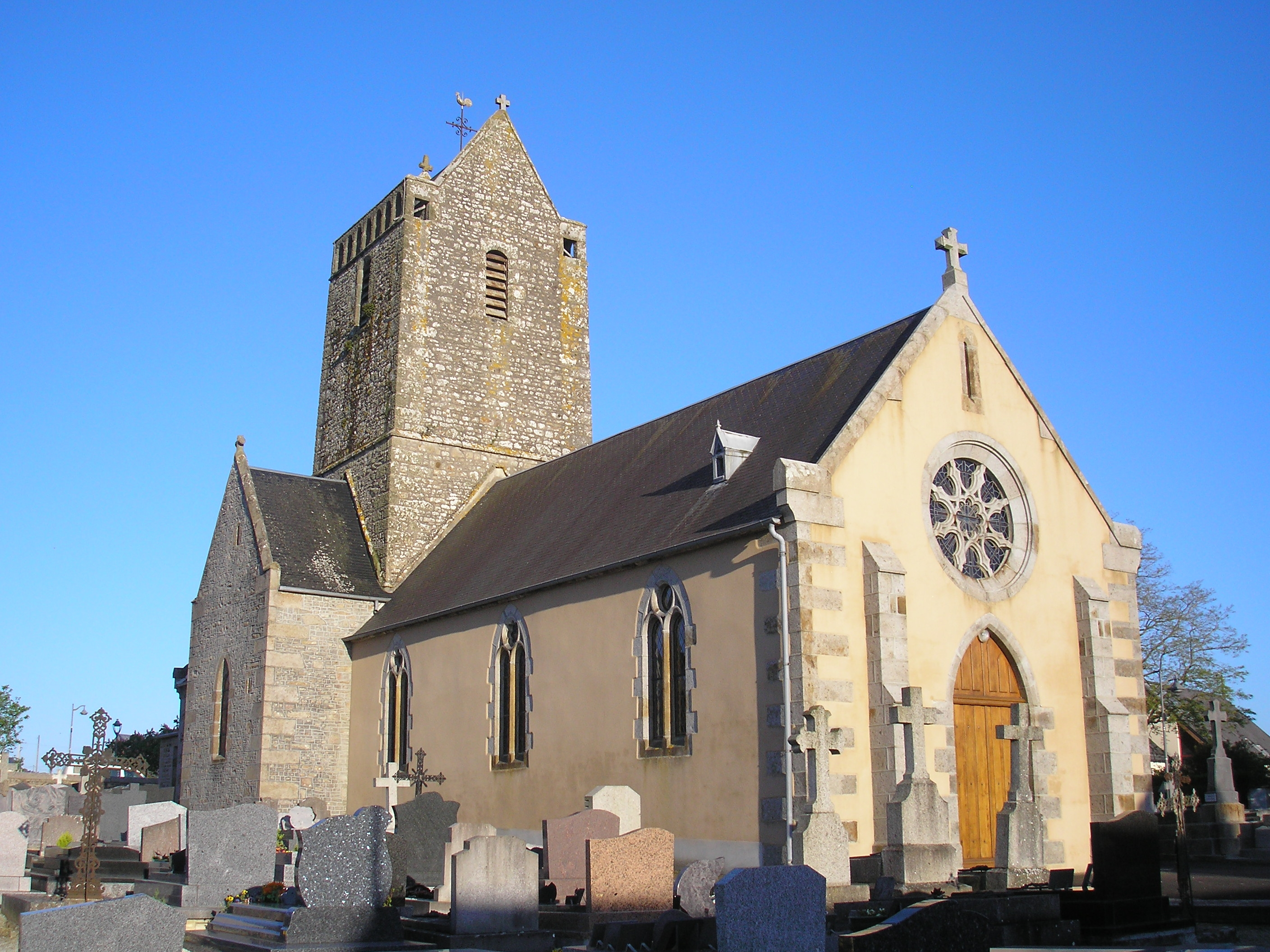 Marcey-les-Grèves (Normandie, France). L'église Saint-Pair.